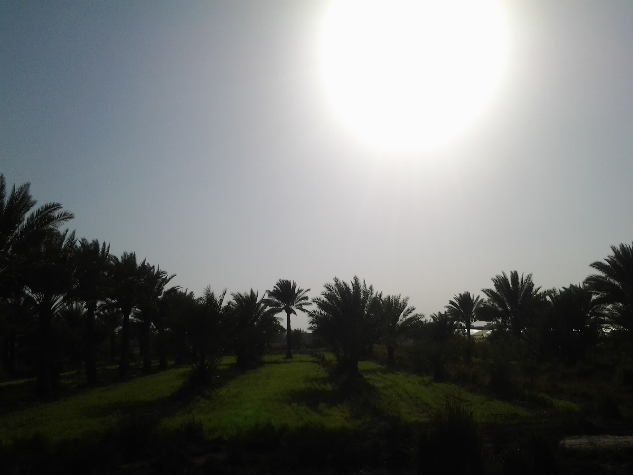 صورة لأحدى بساتين قضاء الطارمية في بغداد